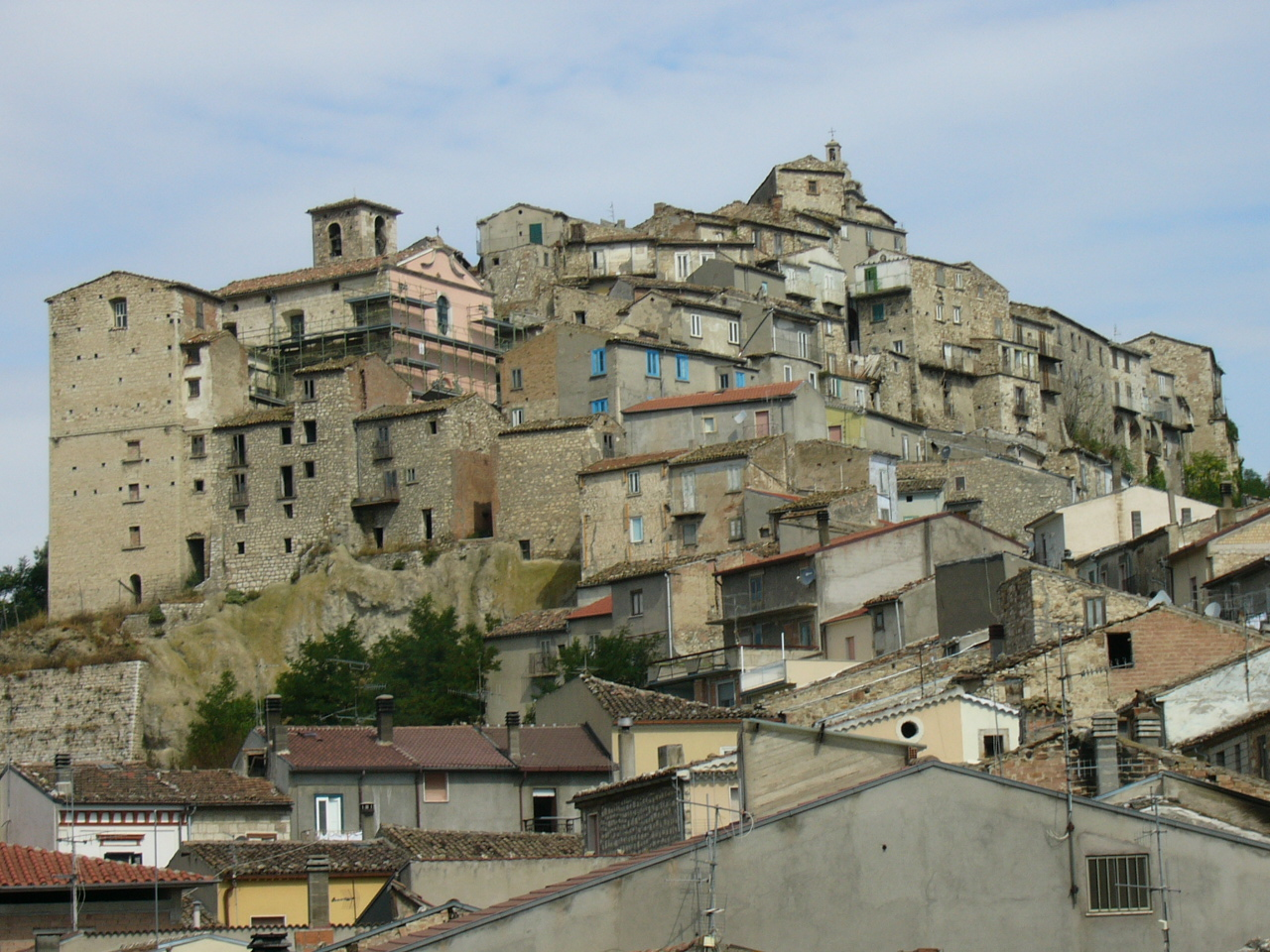 Limosano (centro storico)